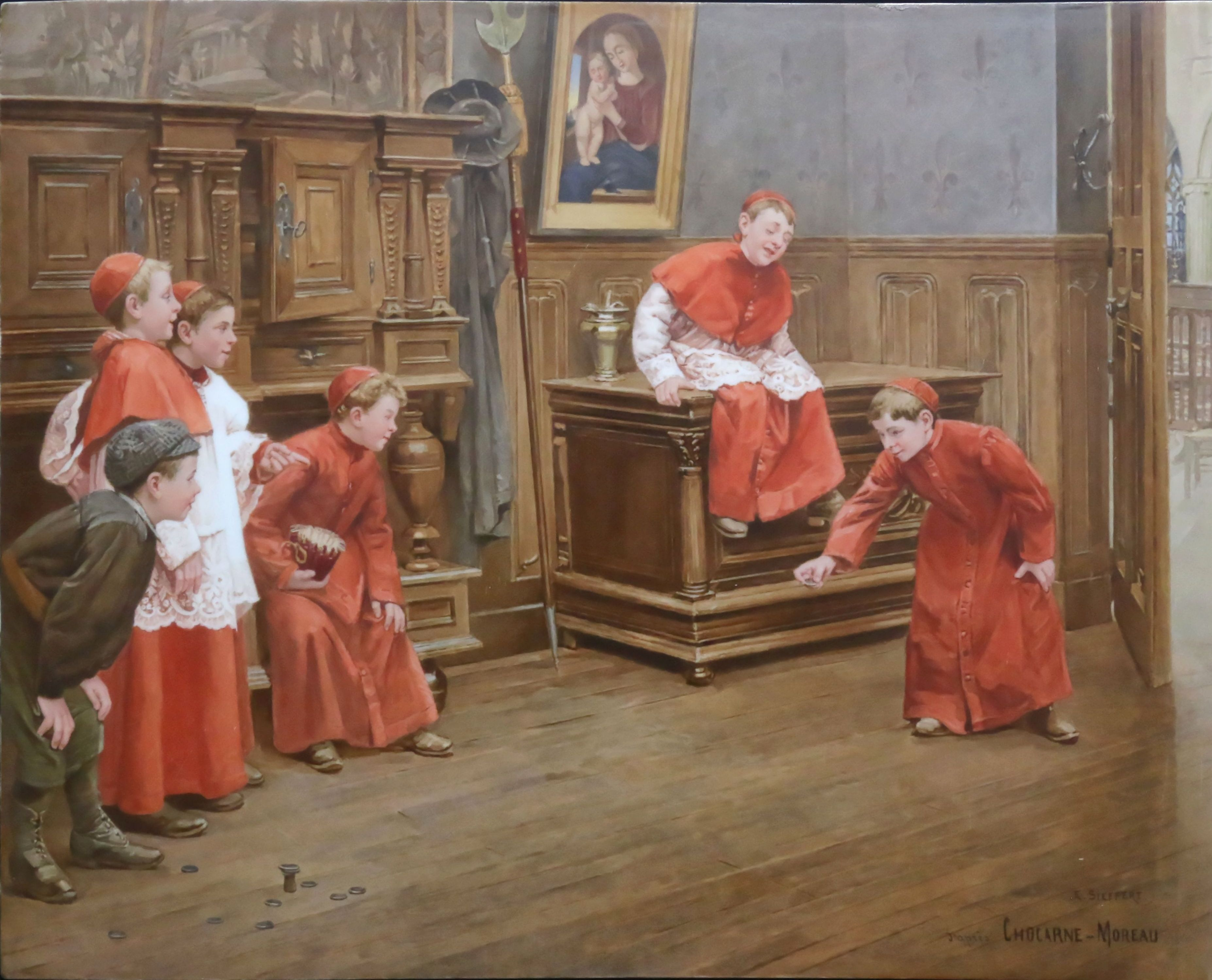 Peinture sur plaque de porcelaine par Louis-Eugène Sieffert, d'après un tableau de Paul Chocarne-Moreau (ca. 1900-1910)